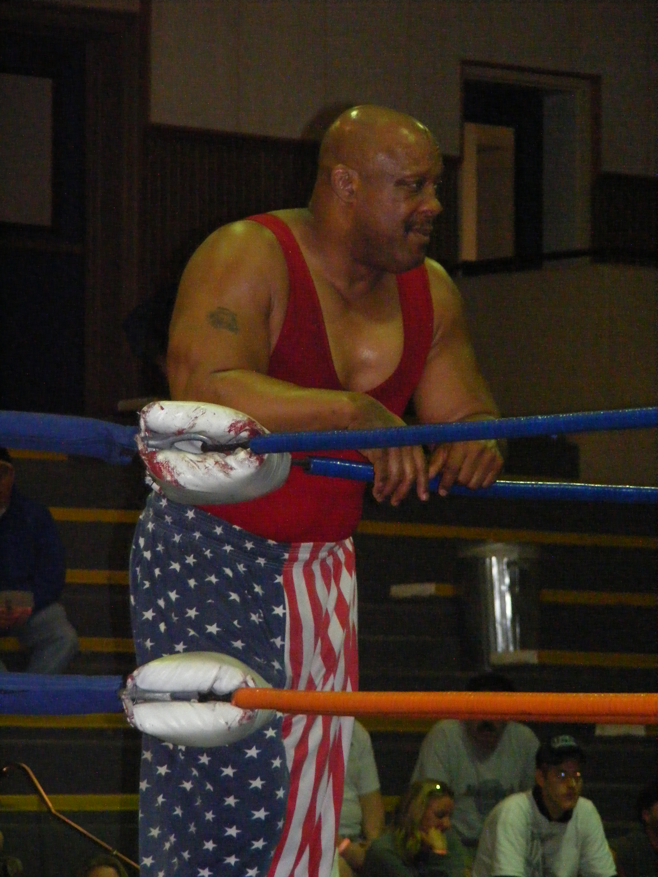 Le catcheur Tony Atlas en 2008.